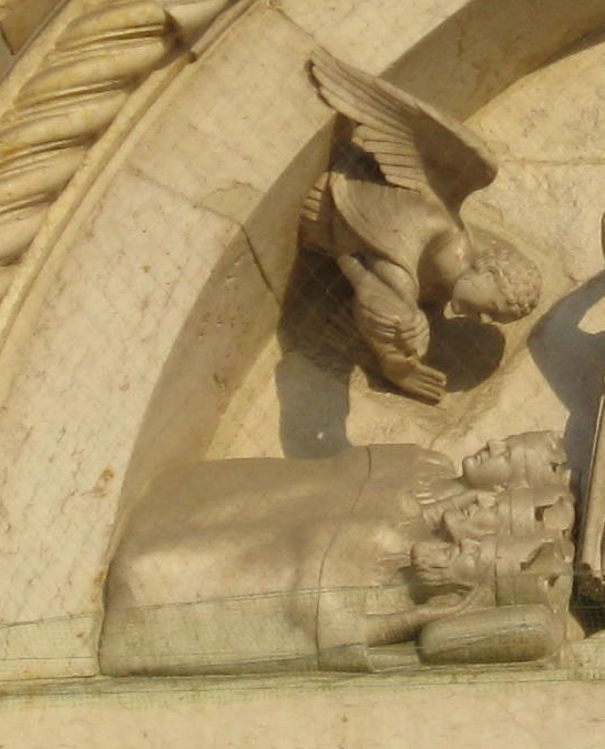 Perkele, il Sogno dei Re Magi nella lunetta di San Mercuriale